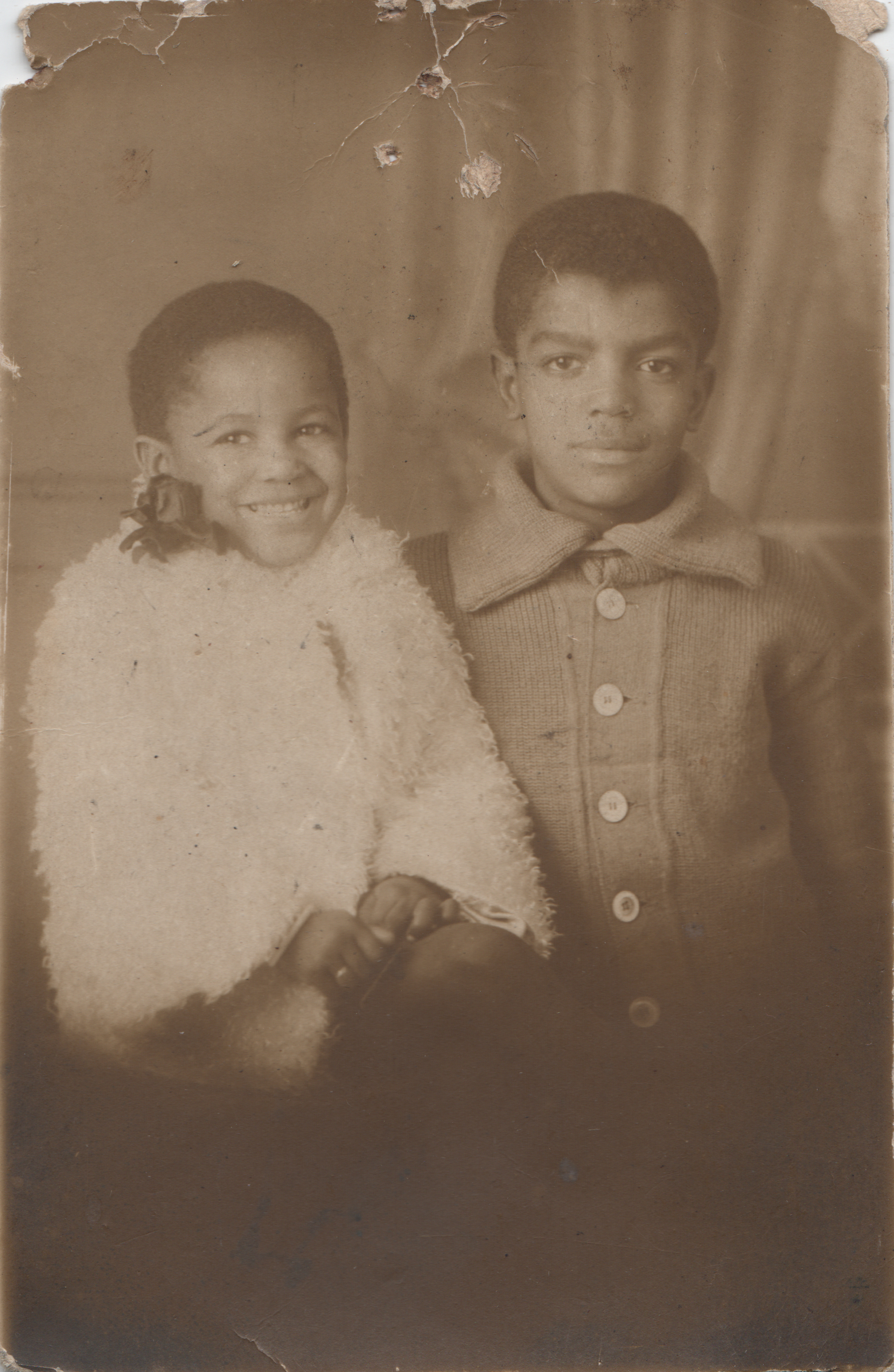 Carta enviada por los hijos de Oscar Rorra a su padre (frente).